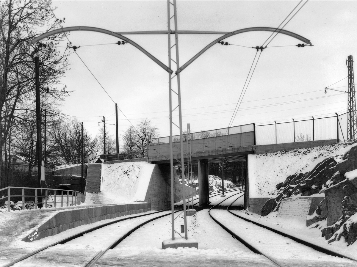 Sognsvannsbanen hadde frem til 1993 en stasjon ved Frøen. Denne lå litt nord for dagens Frøen stasjon, som betjener Holmenkollbanen.